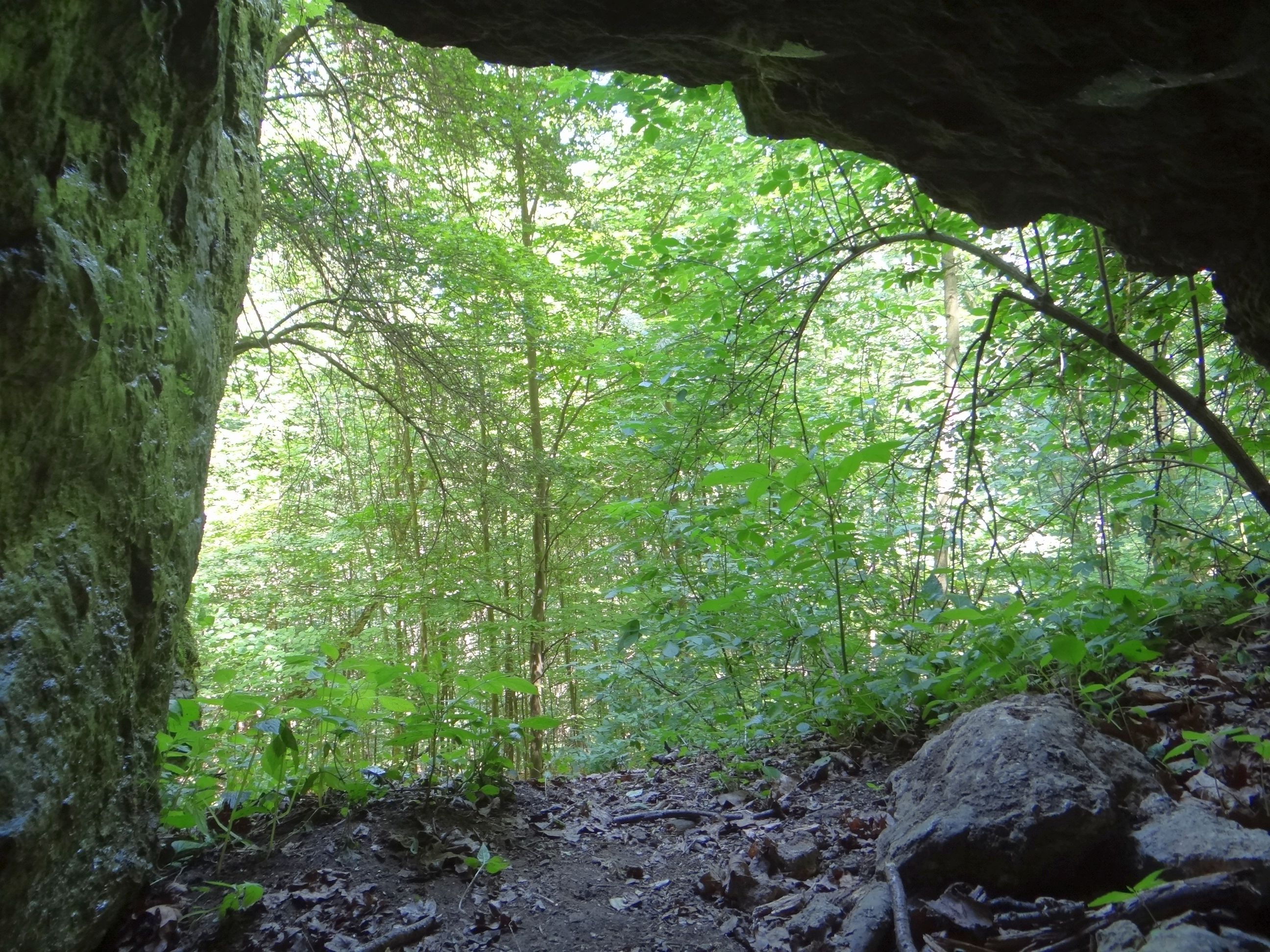 Jaskinia Ducha Gór